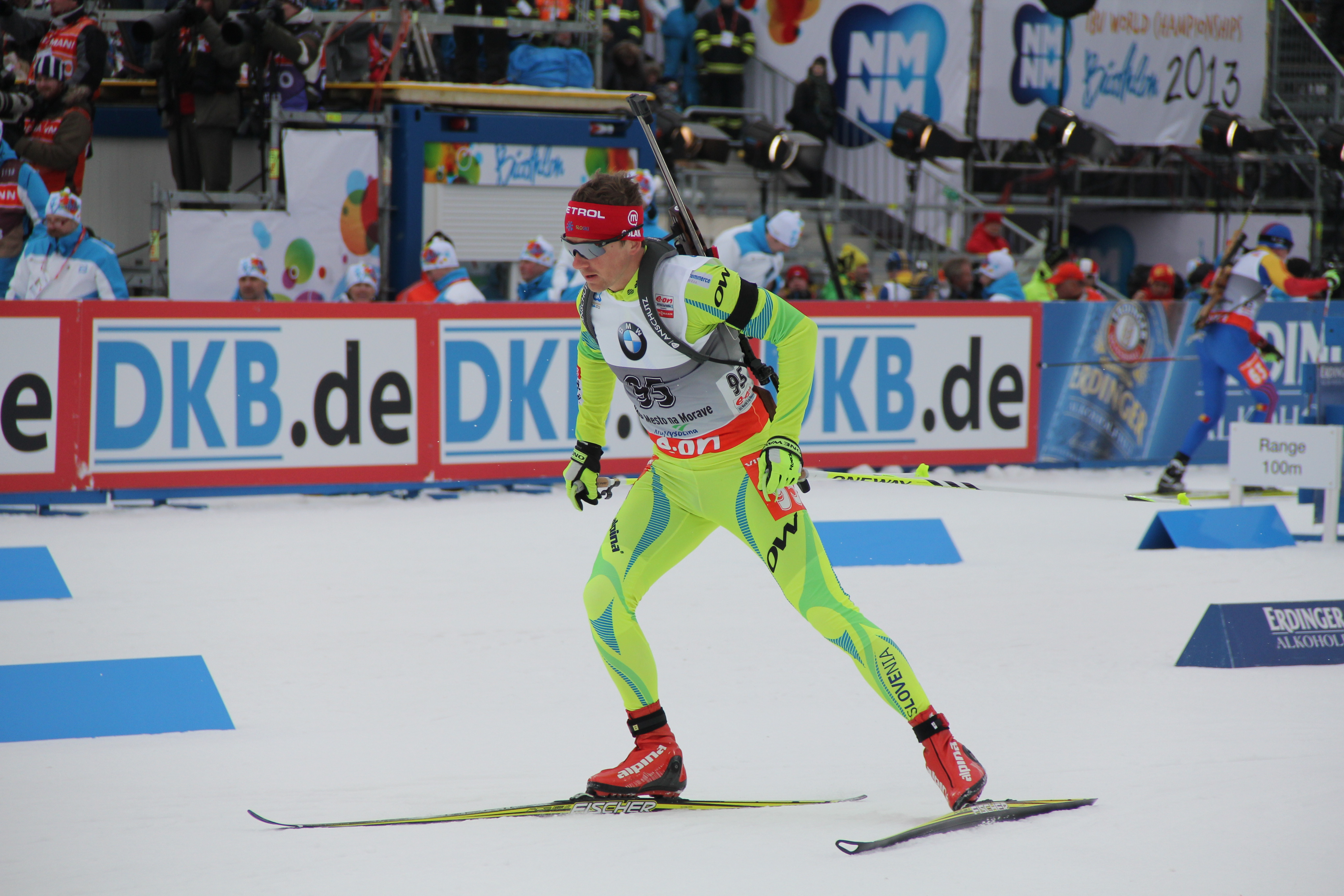 Peter Dokl na svetovnem prvenstvu v biatlonu 2013.